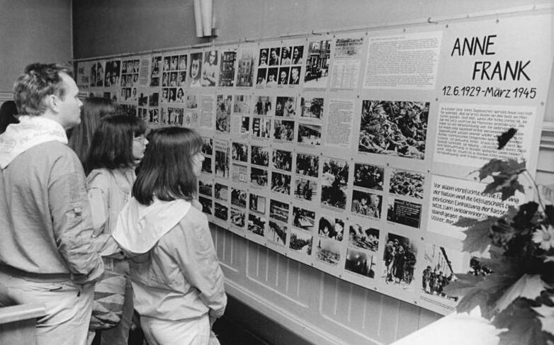 ADN-ZB Oberst 25.6.87 Berlin: Jubiläum-Kirchentag- Zum Rahmenprogramm des "Evangelischen Kirchentages Berlin 1987" gehört die Ausstellung mit dem Titel "Das jüdische Leben" im Gemeindehaus der Sophienkirche in der Großen Hamburger Straße. Ein Teil der Exposition ist dem jüdischen Mädchen Anne Frank gewidmet, das 1945 im KZ Bergen-Belsen ums Leben kam.